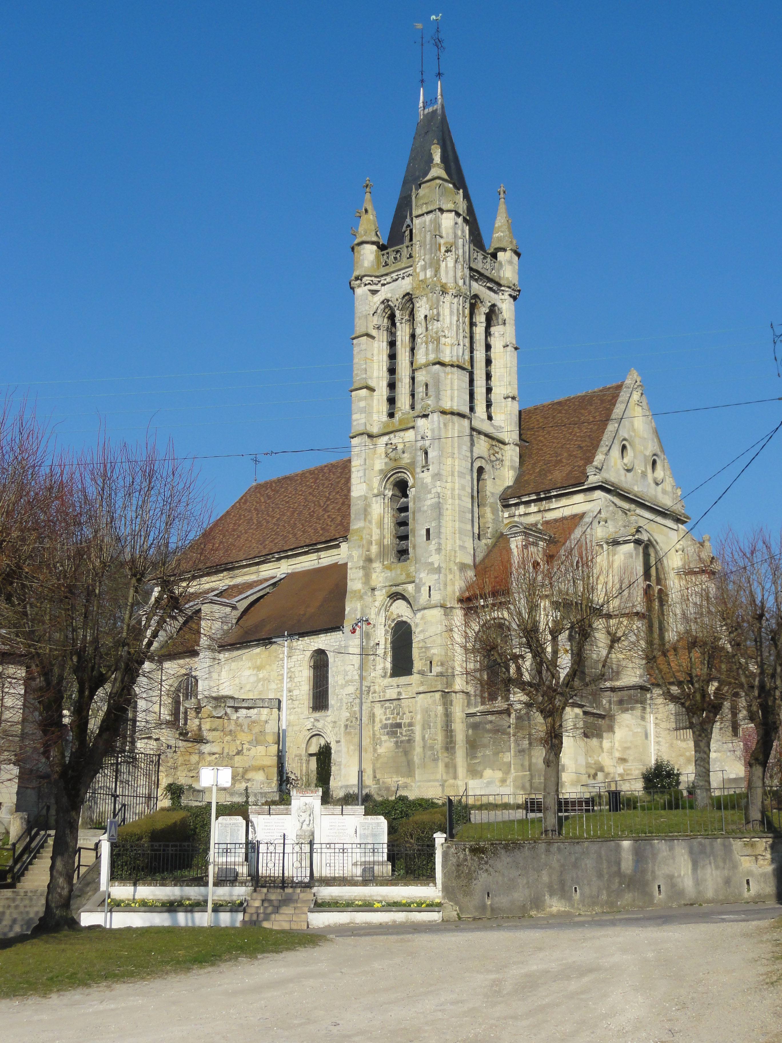 Voir titre.